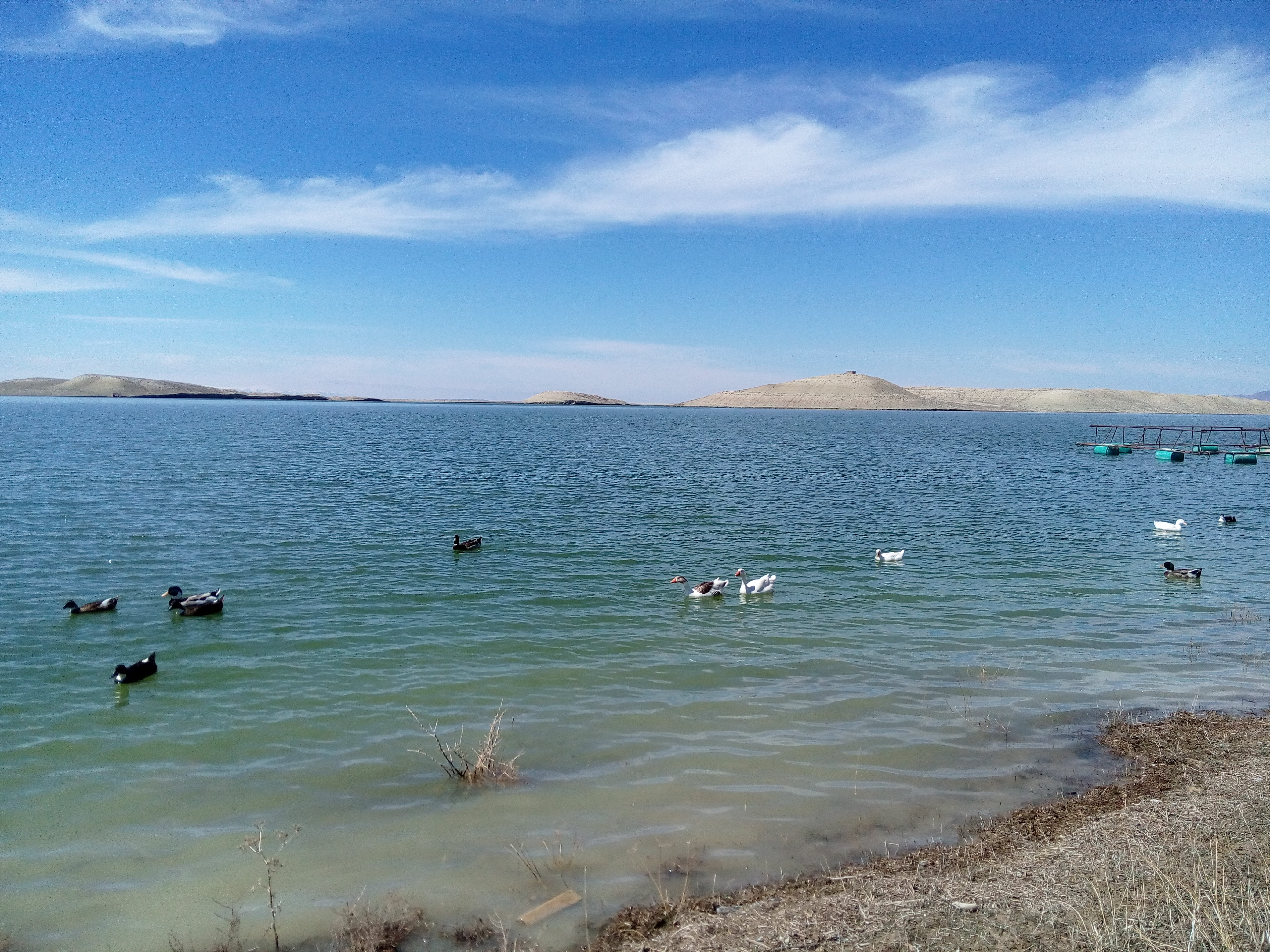 سد طبیعی روستای شوره دل عید نوروز1394